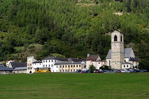 Müstair (Münster): Clostra San Jon (Kloster St. Johann)